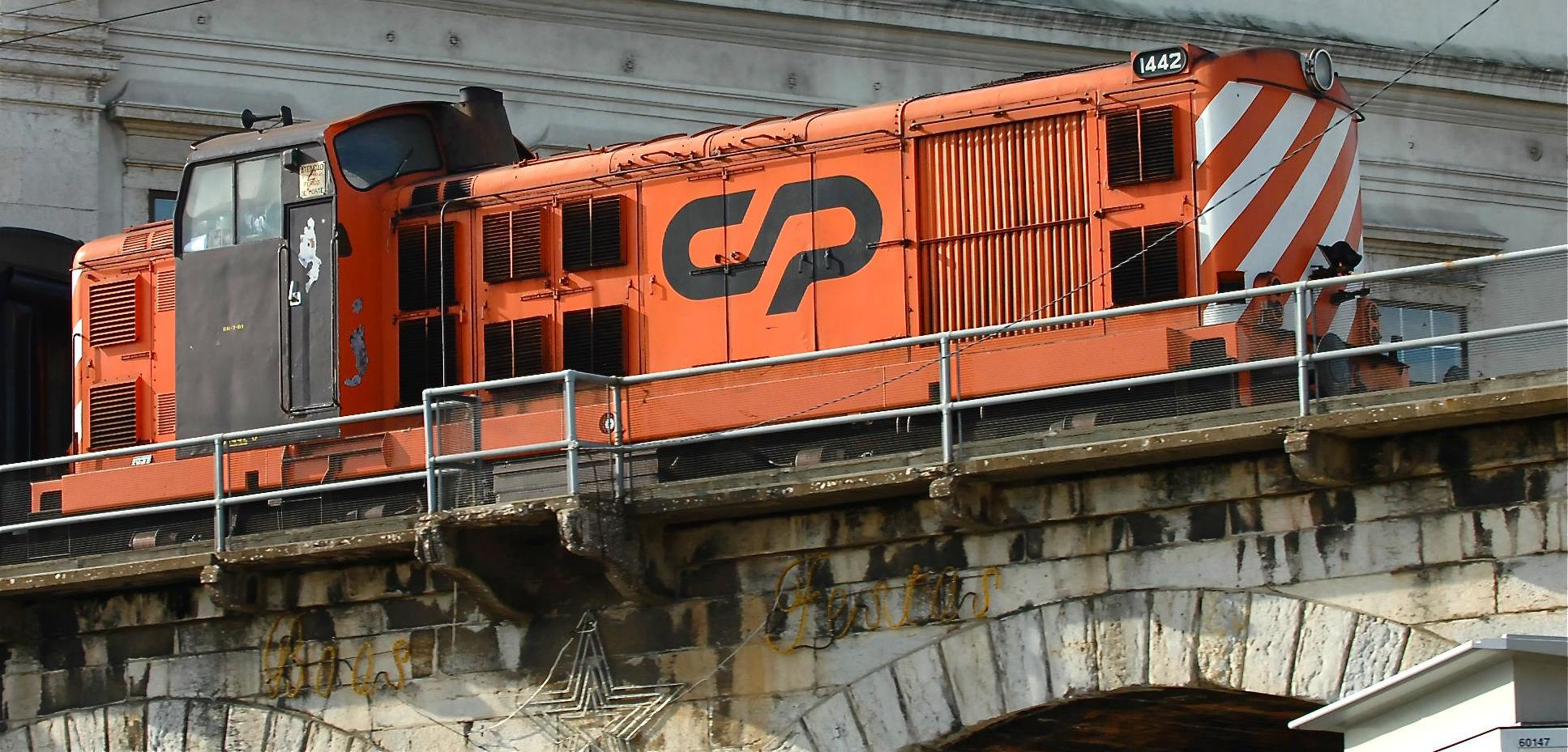 Locomotiva série CP 1400 em Xabregas, Lisbon, Portugal.